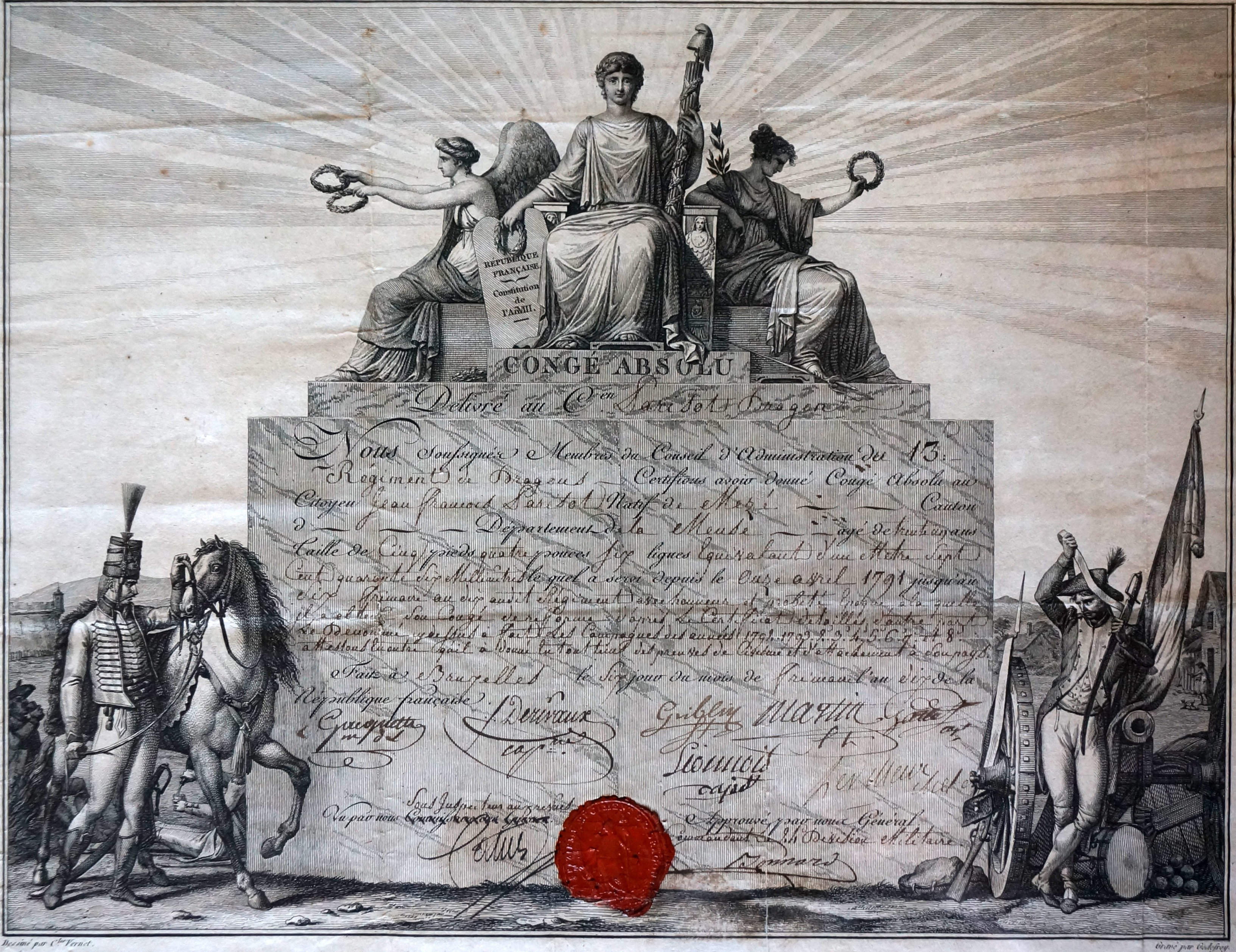 congé de réforme de 1802, délivré à Bruxelles le 6 Frimaire An X.